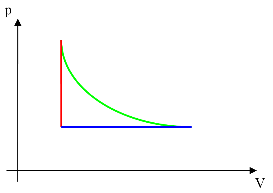 En kredsproces indenfor termodynamikken som viser tre delprocesser: en isokor (rød lodret linje), isobar (blå vandret linje) og isoterm delproces (grøn kurve).